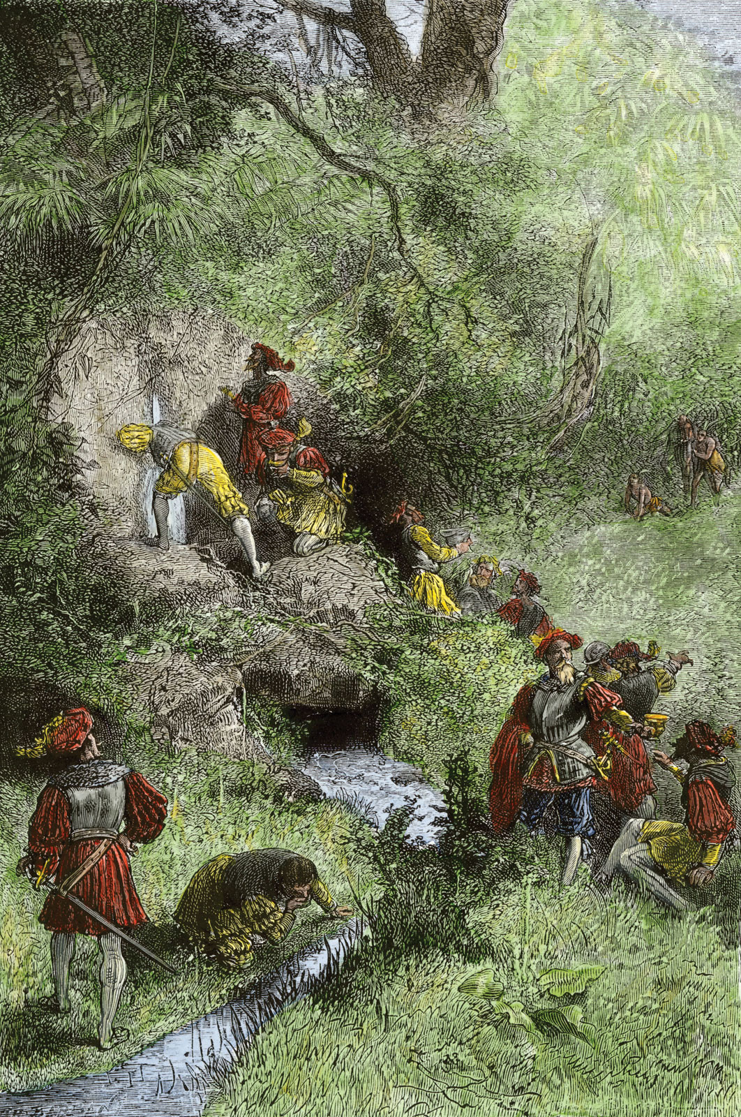 Ponce de León auf der Suche nach dem Jungbrunnen